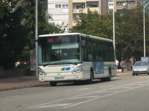 Autobus IRISBUS Citelis 12 n°139 de l'ancien réseau Mâcon-Bus, assurant la ligne 4 (Gare SNCF - Murgeret) circulant Avenue De Gaulle à Mâcon.